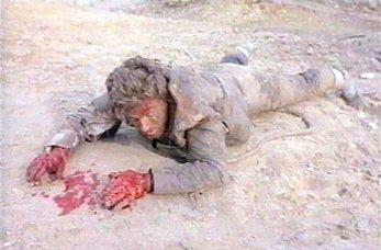 Django (részlet)